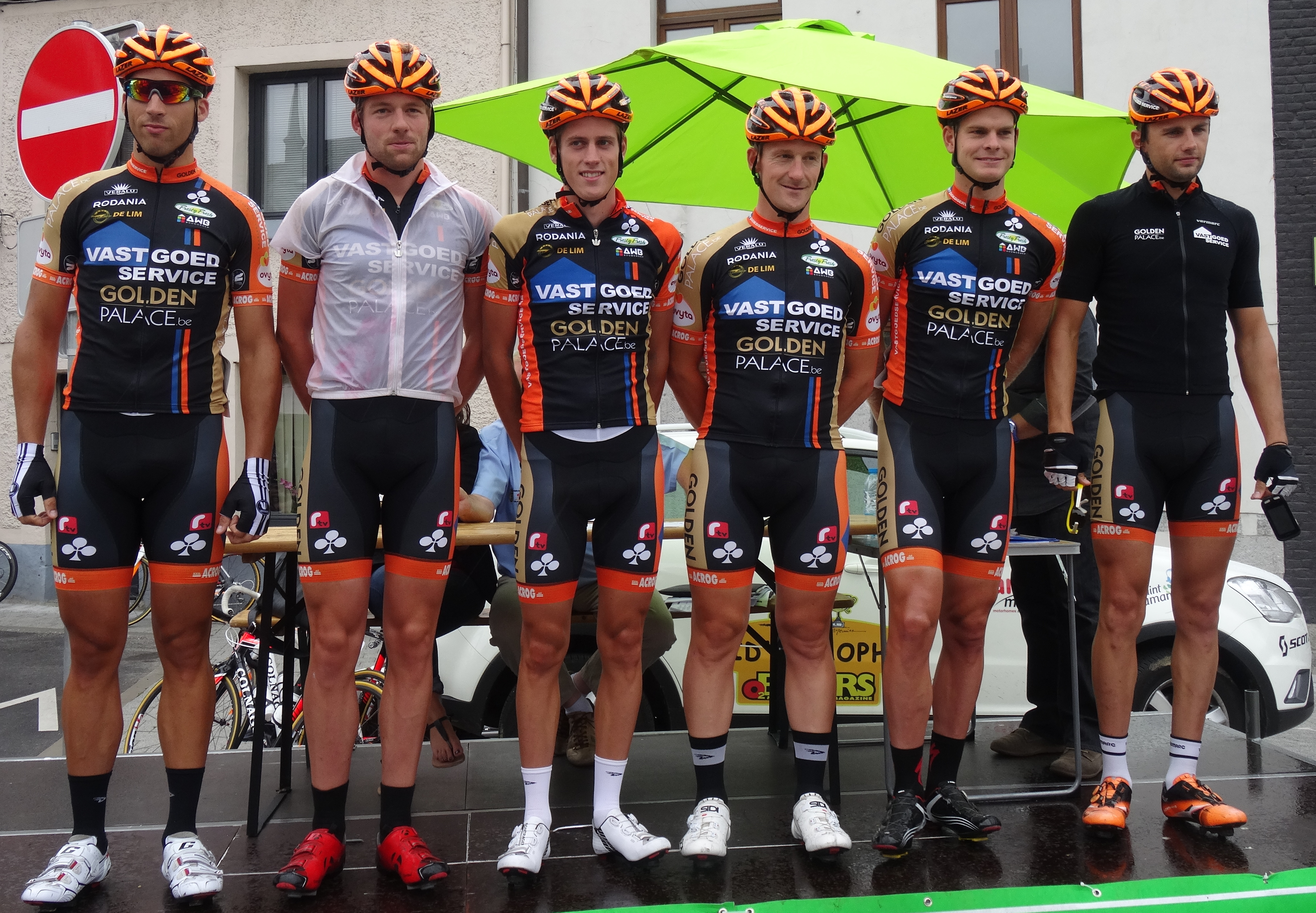 Reportage photographique réalisé le mercredi 6 août à l'occasion du départ de la première étape du Tour de la province de Namur 2014 à Jambes (Namur), Belgique.